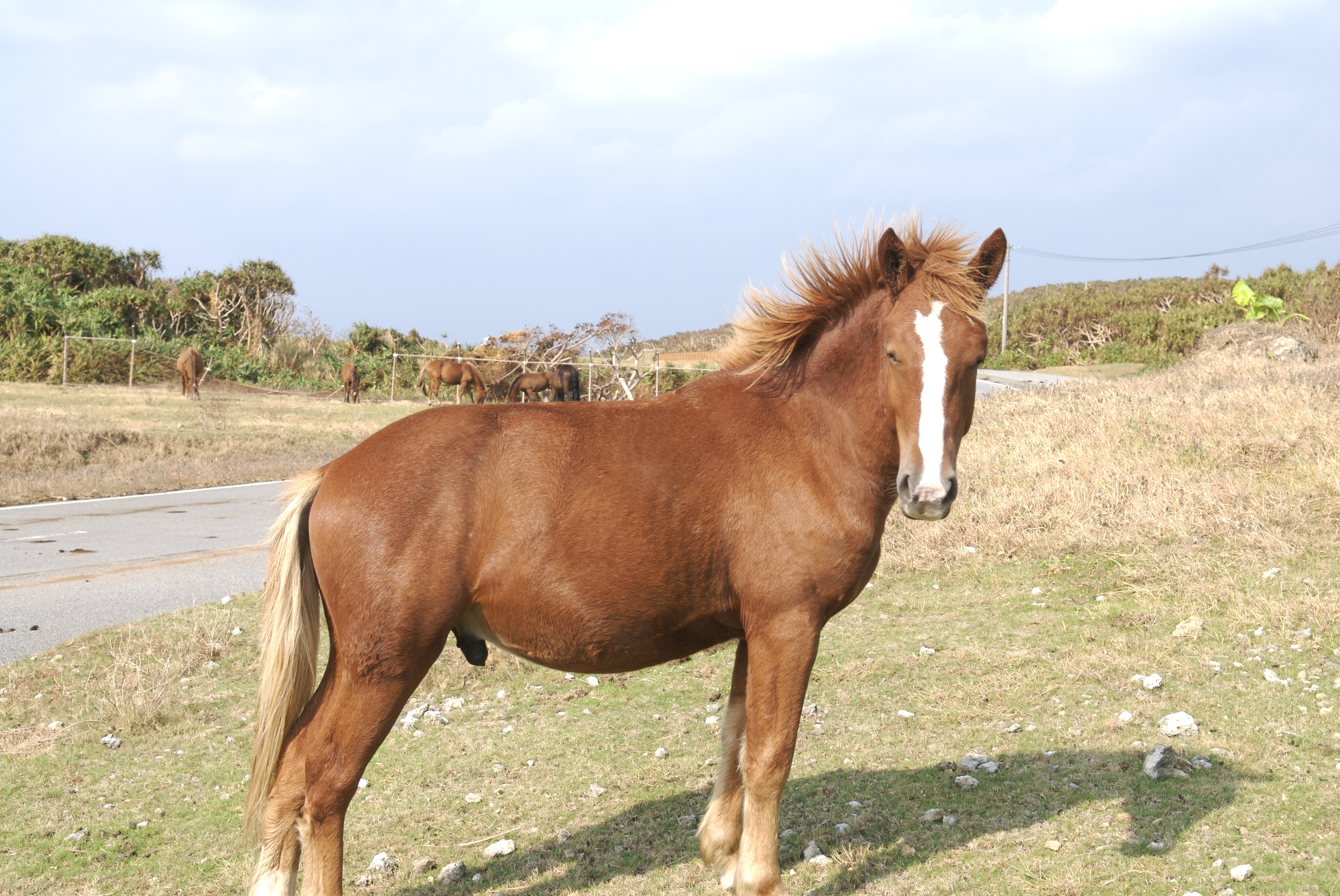 @Yonaguni Island